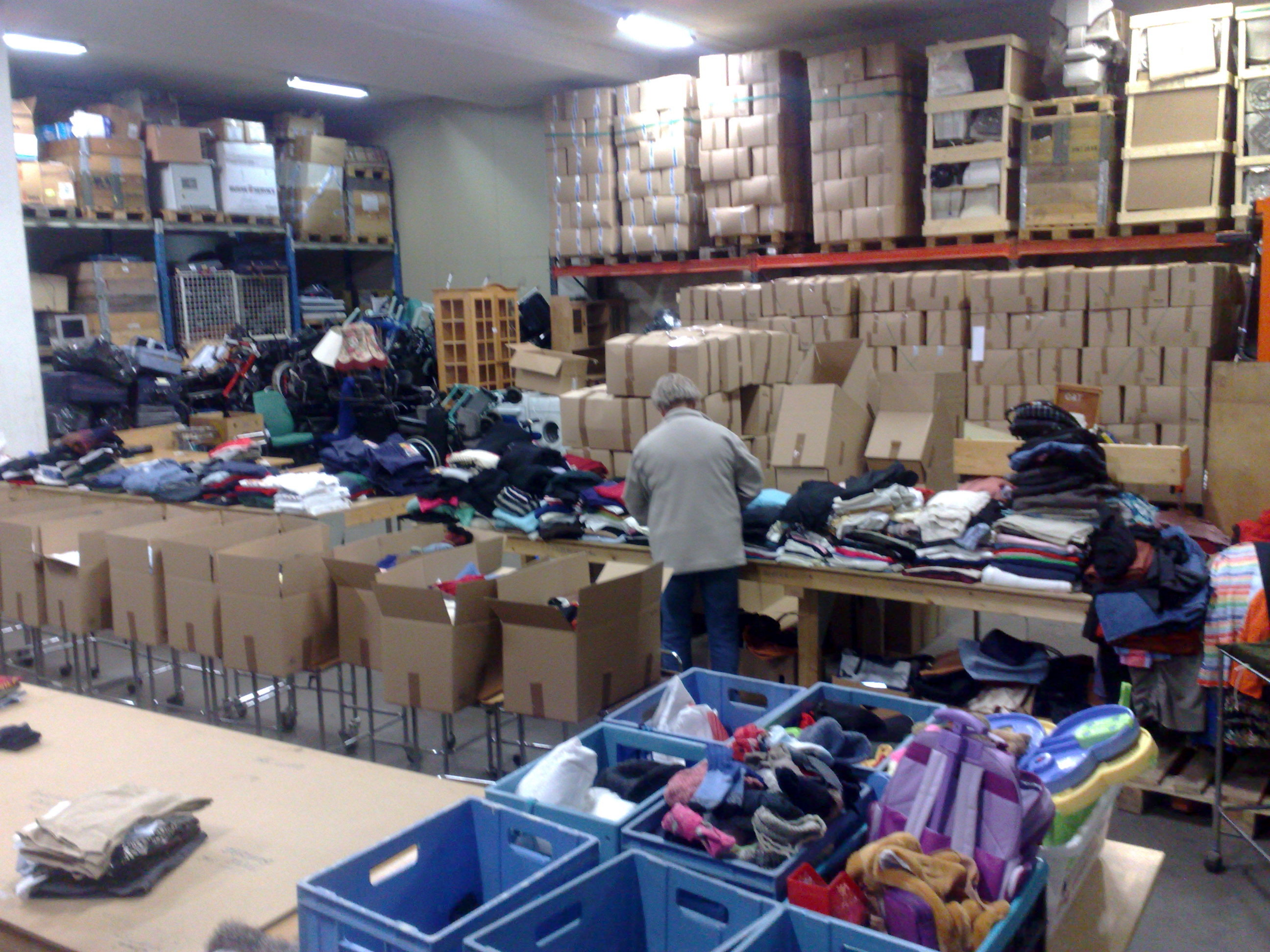 pakking av familiepakker på grenlandsaksjonens lager på mæla